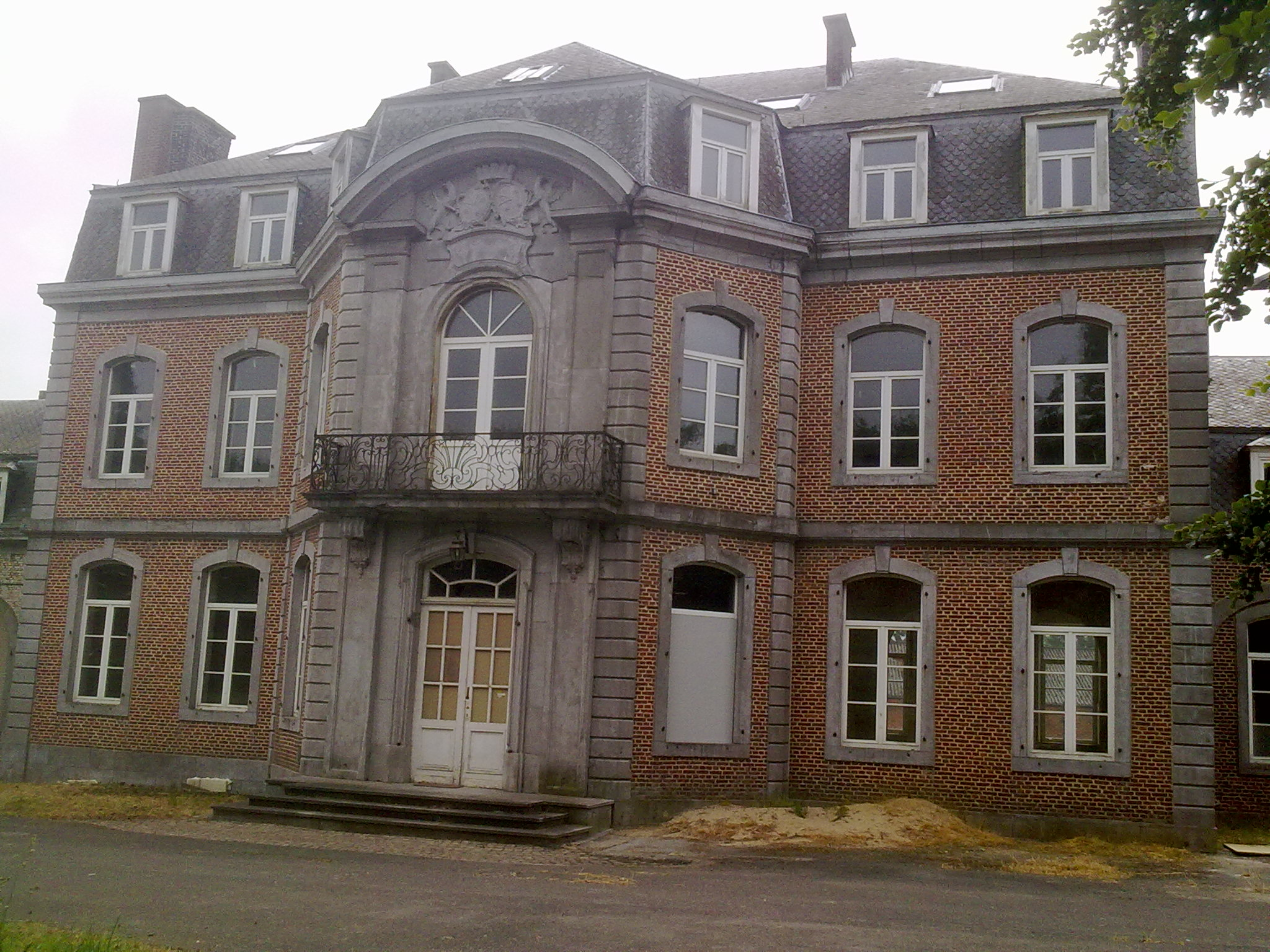 Le château de Suarlée vendu aux Ponty en 1699, passée par alliance aux Zualart dans le 2e quart du XIXe siècle.